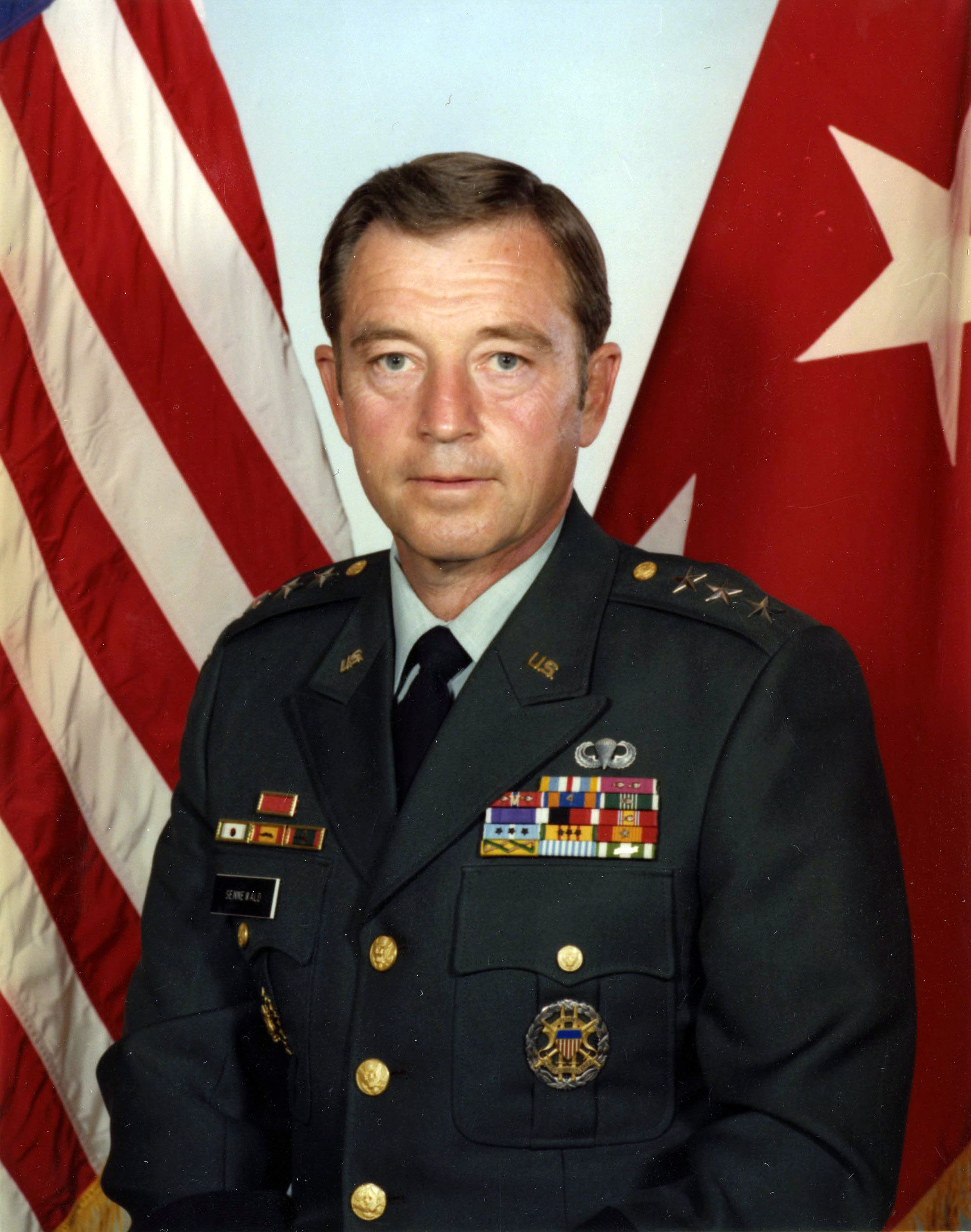 LGEN Robert W. Sennewald, USA, Sep 1981